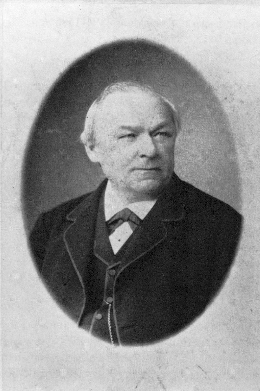 Maximilian von Kern (1813-1887), erster Präsident des Oberlandesgerichts Stuttagrt (1879-1886).